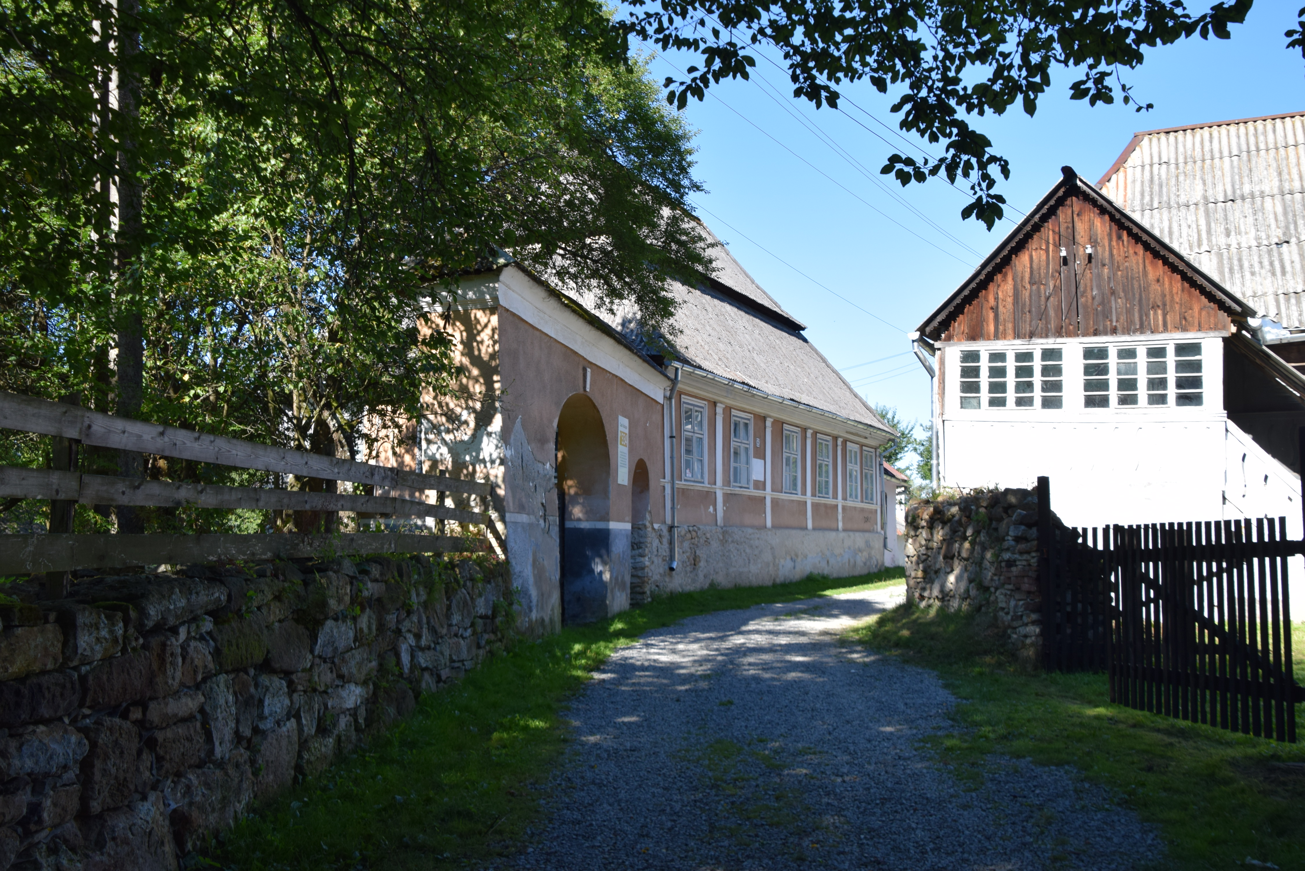 Casă, nr. 334 din Roșia Montană